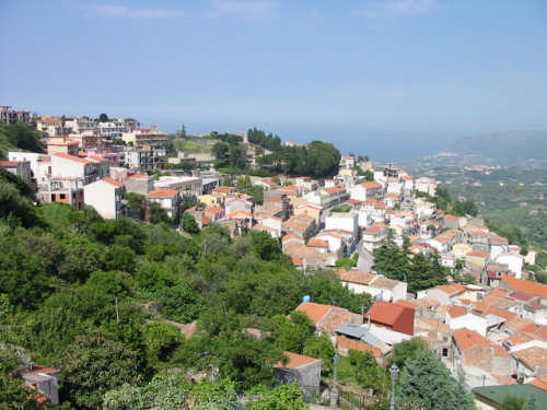 Vista di Montagnareale